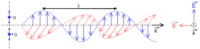 uhin elektromagetikoa